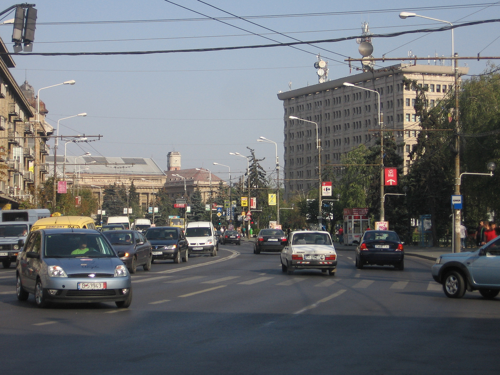 bulevard cu casa alba si palatul culturii